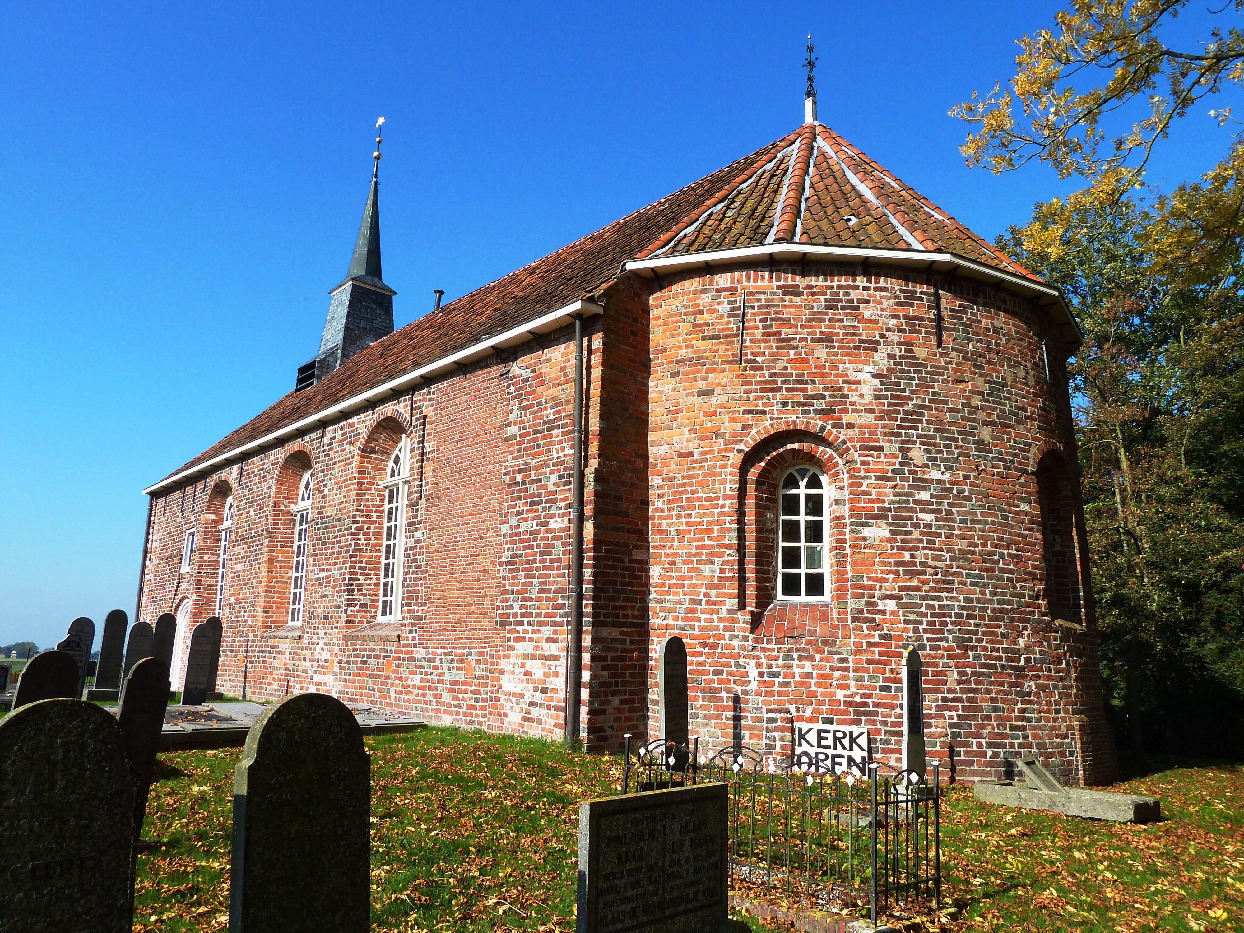 Hervormde kerk van Oosterwijtwerd (Groningen, Nederland).